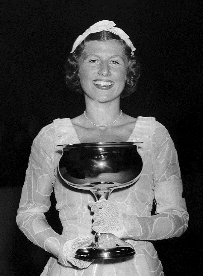 Cecilia Cooledge, championne de patinage : [photographie de presse] / Agence Meurisse